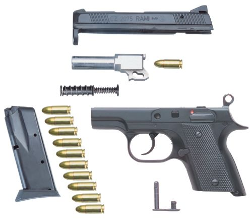 Rami 2075 rozborka